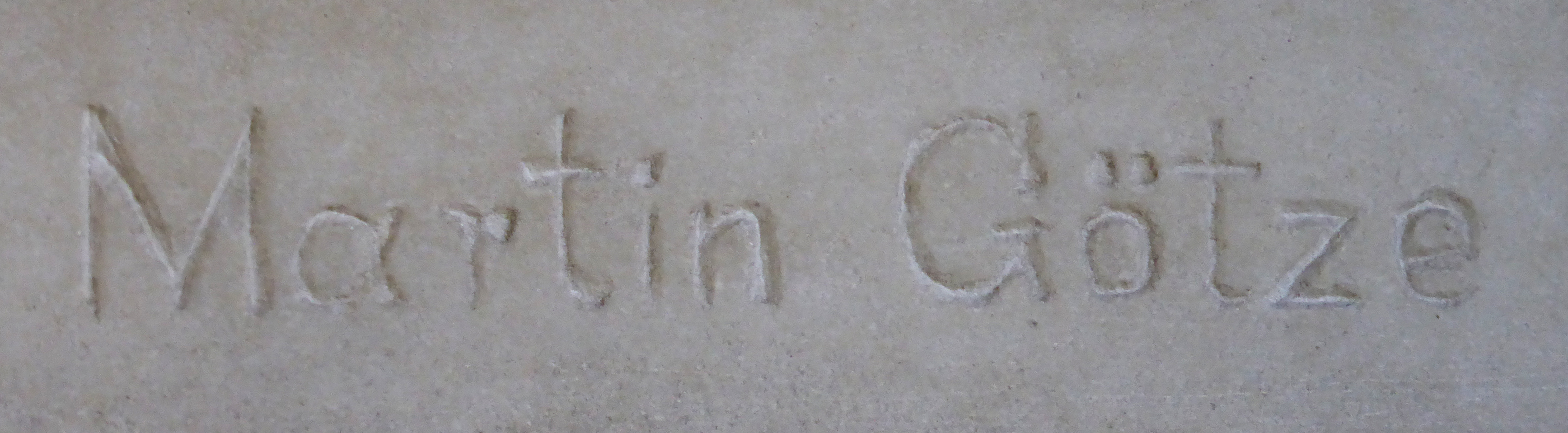 Marmorbüste Karl von Thielen vom Bildhauer Martin Götze von 1910. Ausgestellt im Deutschen Technikmuseum in Berlin. Inventarnummer: VBM E-B-5002. Wikipedianische KulTour am 10. Oktober 2015 in der Ausstellung des Museums.